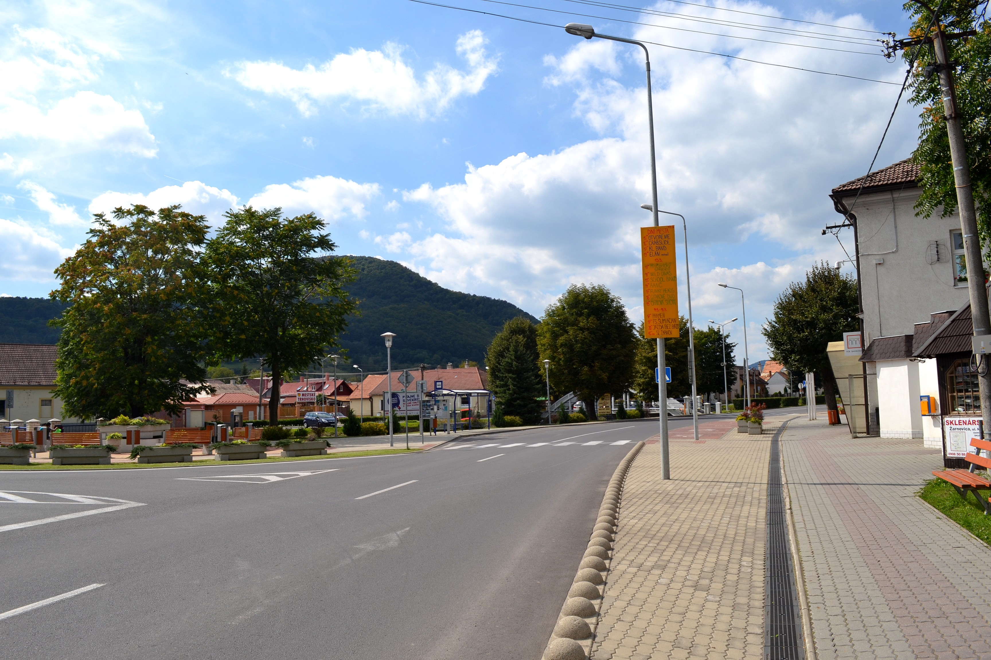 Pohľad na centrum Žarnovice